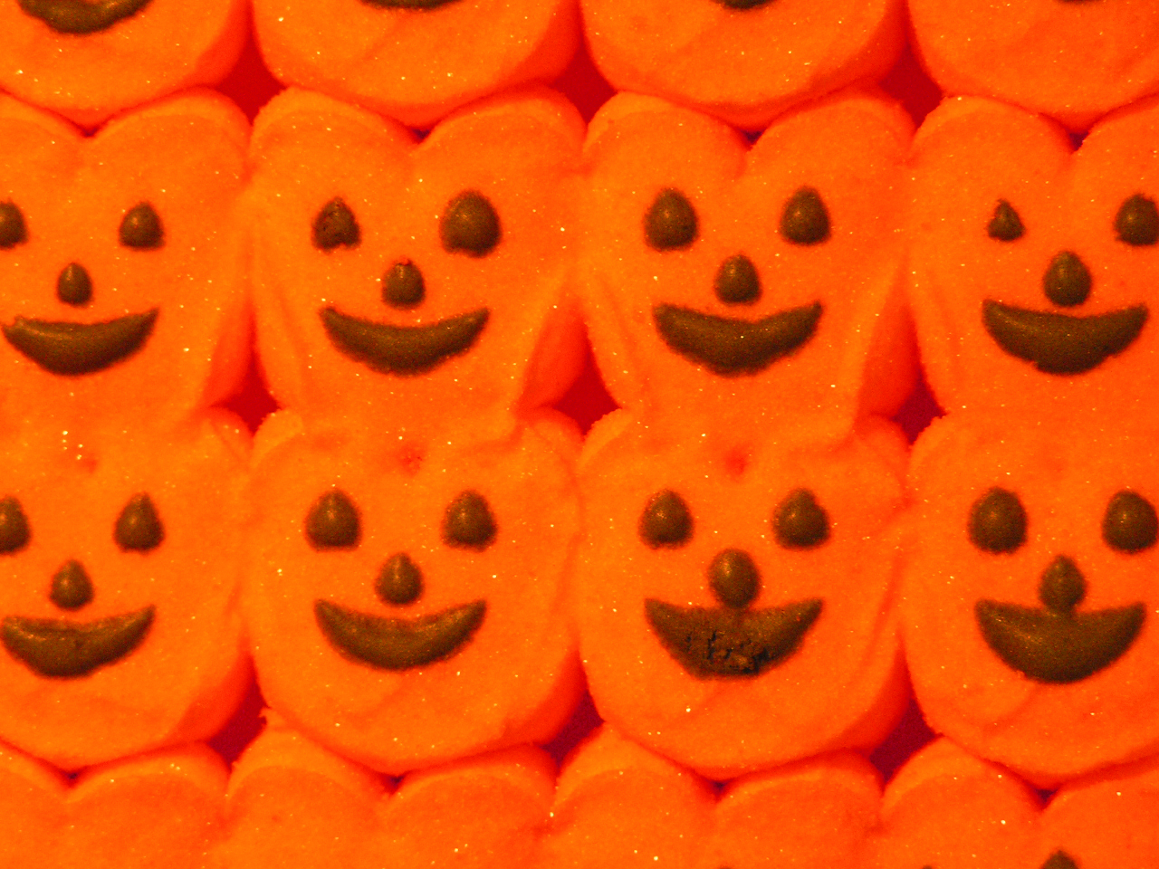 Orange Halloween Peeps